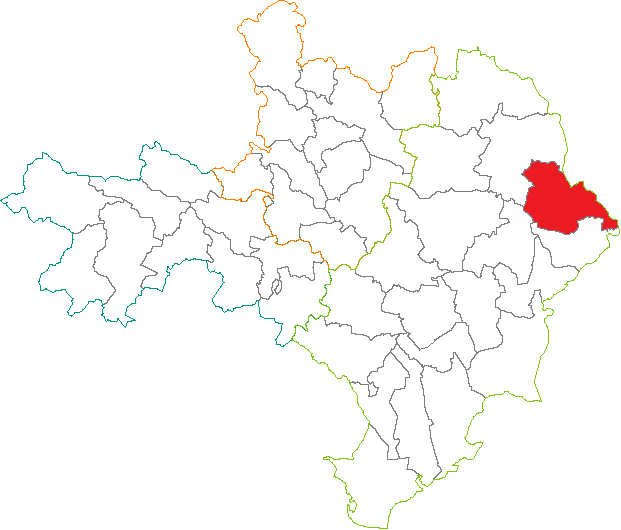 Situation du canton dans le département du Gard (France)